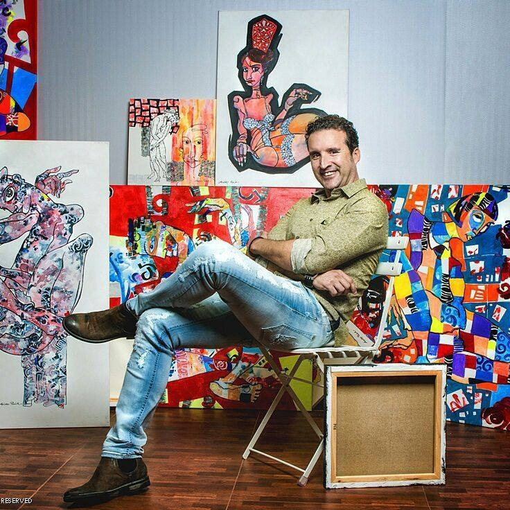 El artista español Alvaro Peña en su estudio